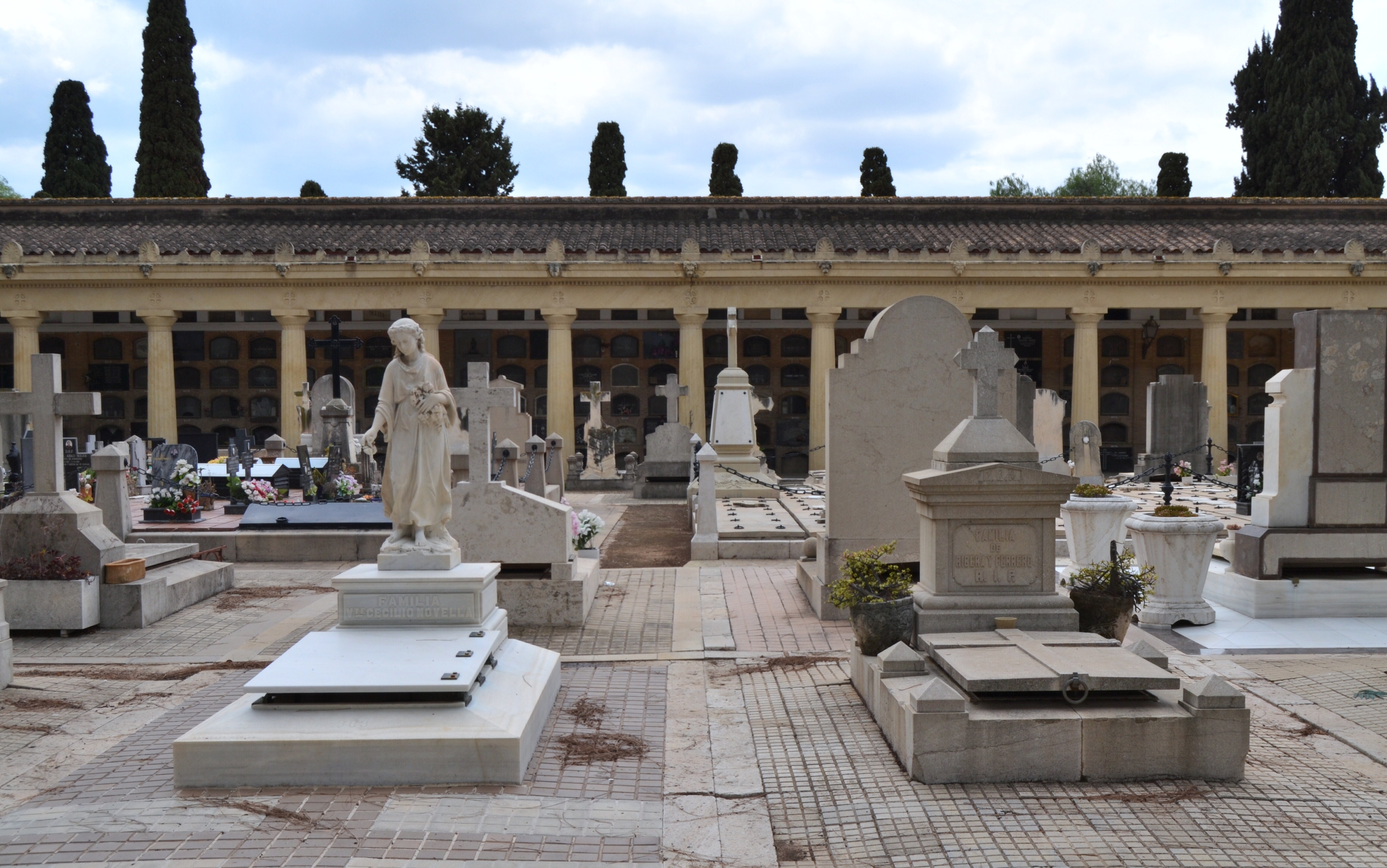 Cementeri General de València, tomba a la zona dels pòrtics.